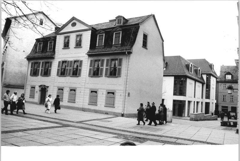 Weimar, Schillerhaus Schillermuseum ADN-ZB Ludwig-9.11.1988 Bez. Erfurt: Schiller-Museum- In Weimar wird am 10.11.88, dem 229. Geburtstag der Dichters, im neuen Schiller-Museum seiner Bestimmung übergebe, Der Neubau ist direkt mit dem historischen Schillerhaus (l.) verbunden. Während im alten Haus der Wohn- und Lebensbereich Schillers und seiner Familie nach authentischen Vorlagen dargestellt ist, ist die Ausstellung in den neuen Räumen dem Leben, dem Werk und der Werkwirkung zu Zeiten Schillers sowie der Rezeptionsgeschichte des Werkes bis in die Gegenwart gewidmet. (siehe 18 und 19N